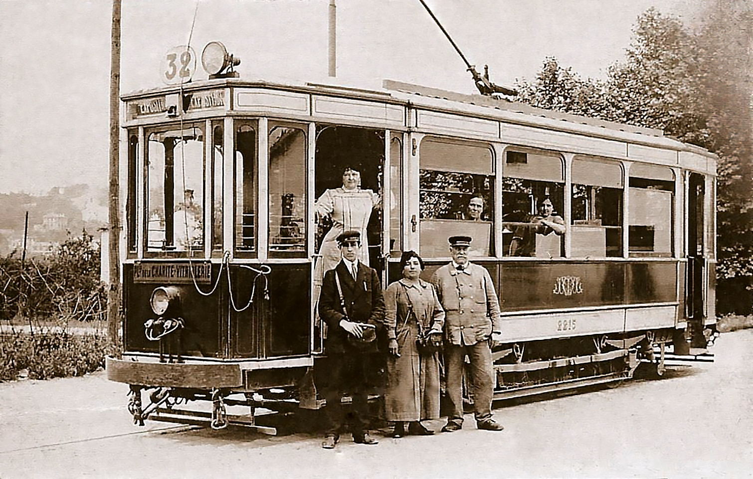 Lyon, alte Meterspur-Tram; Endstation La Mouche, Linie n°32, Avenue Tony Garnier.